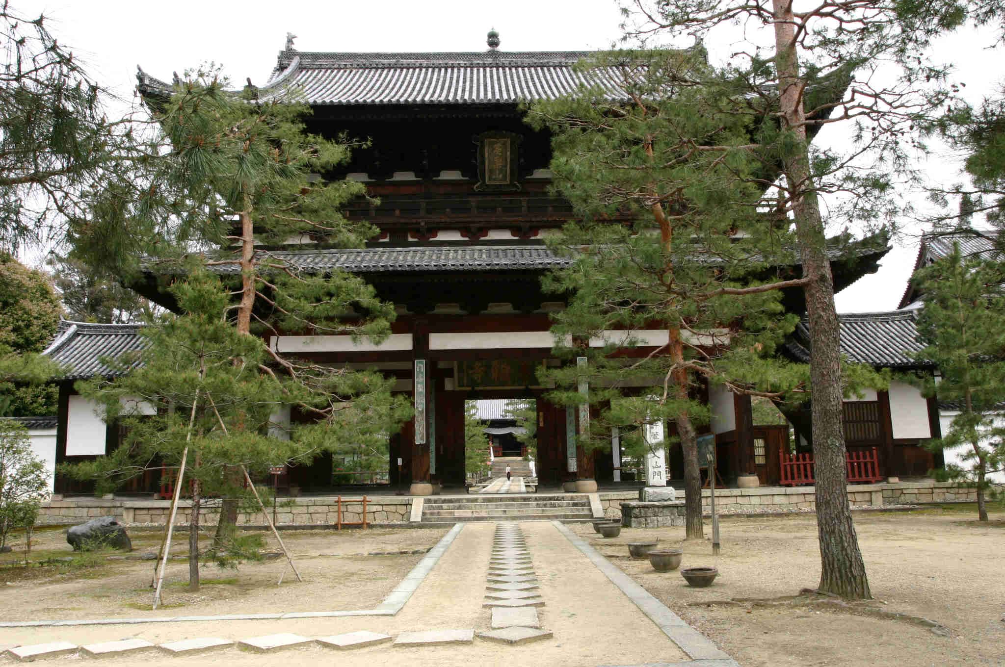 Manpuku sanmon-1